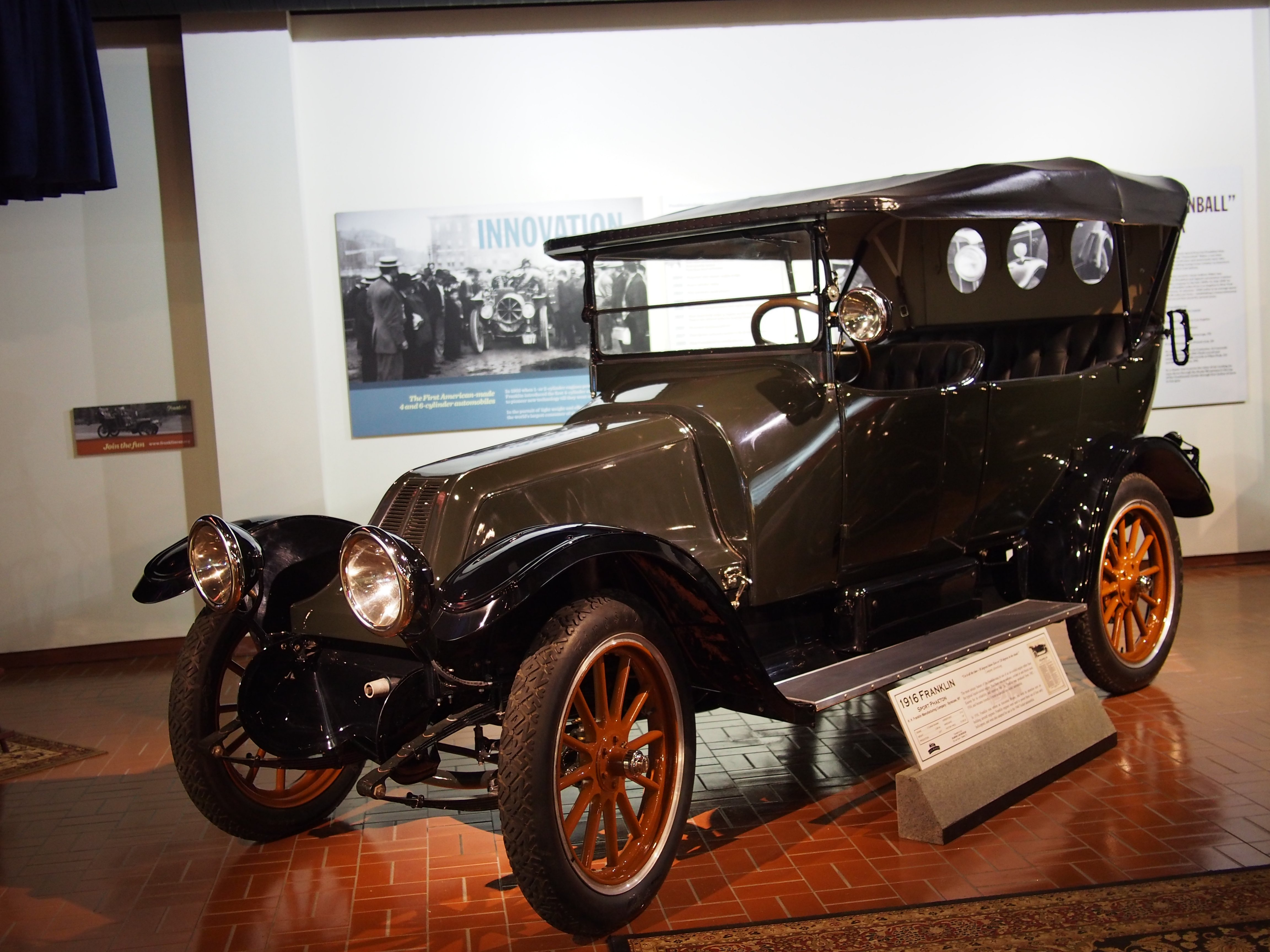 1916 Franklin Sport Phaeton